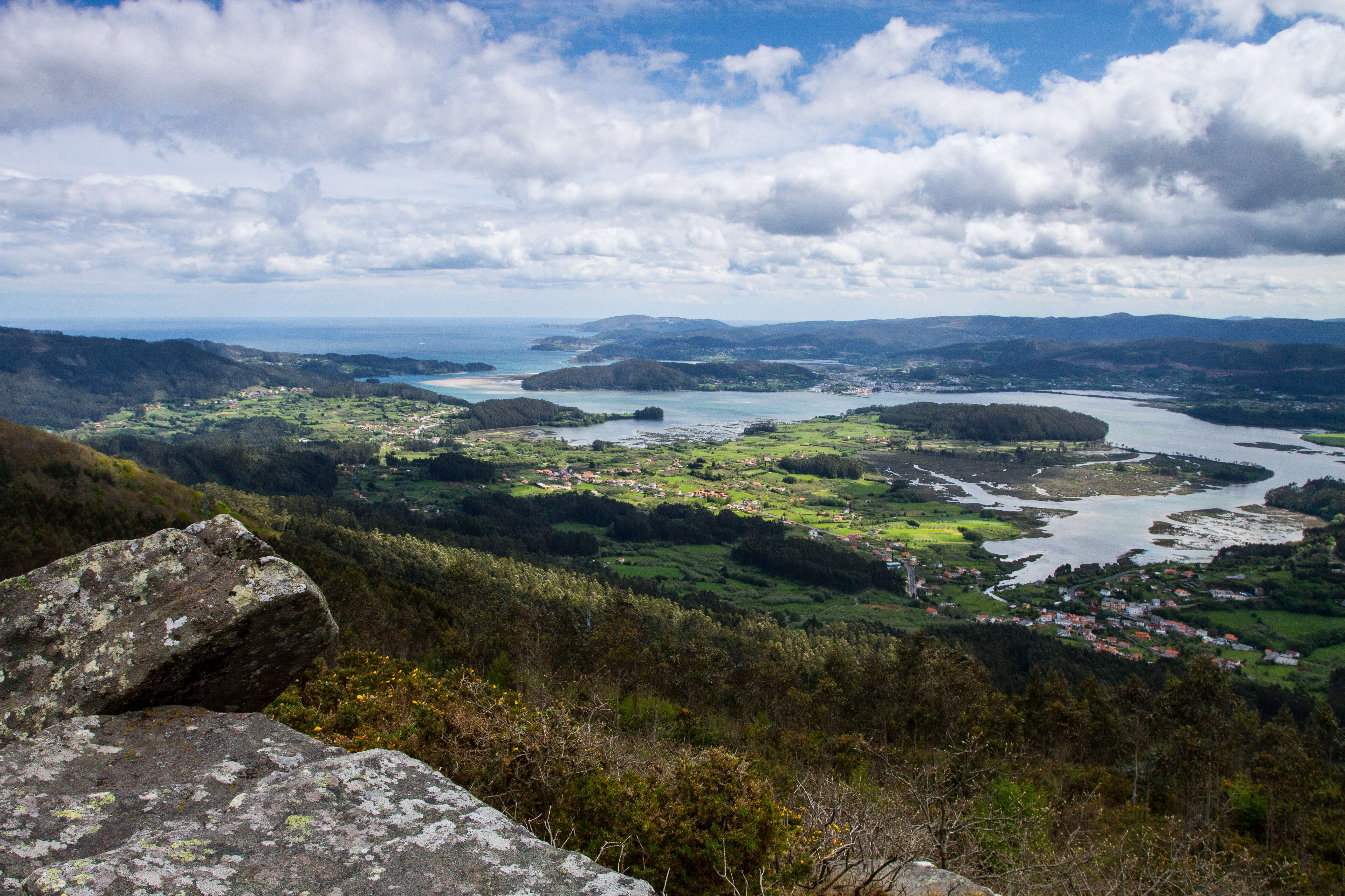 Ortigueira-Mera Ría de Ortigueira desde la sierra de A Capelada This is a photography of a Site of Community Importance in Spain with the ID: ES1110001. Natura2000 entry, EEA entry